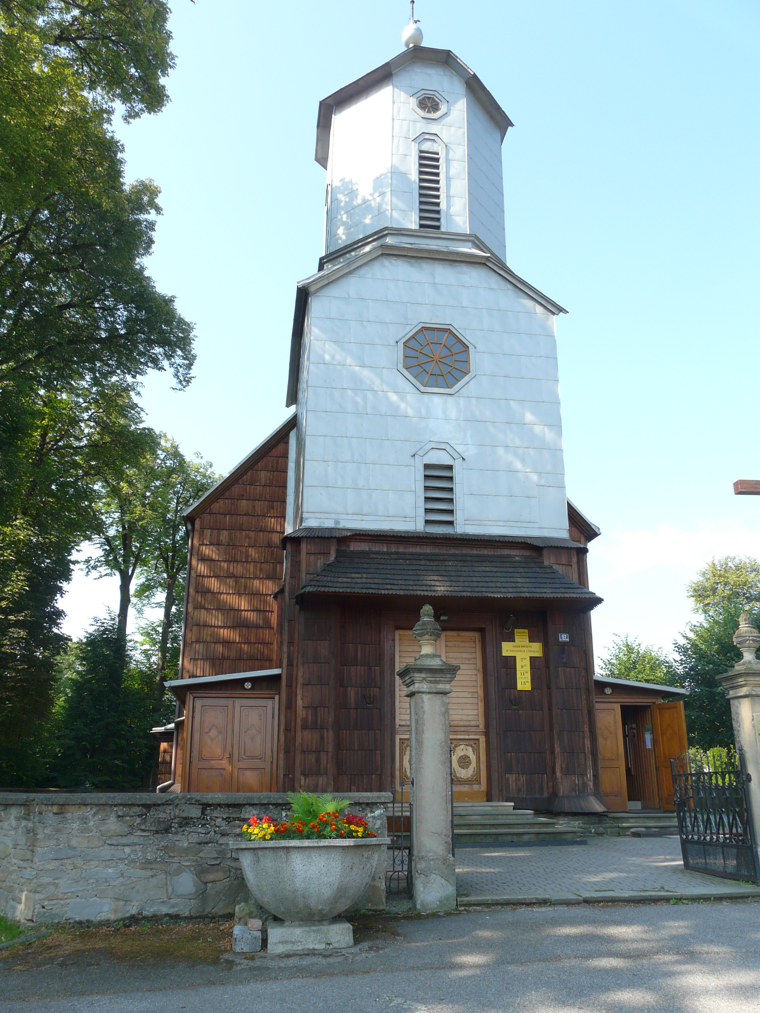 Klimkówka - kościół parafialny p.w. św. Michała Archanioła